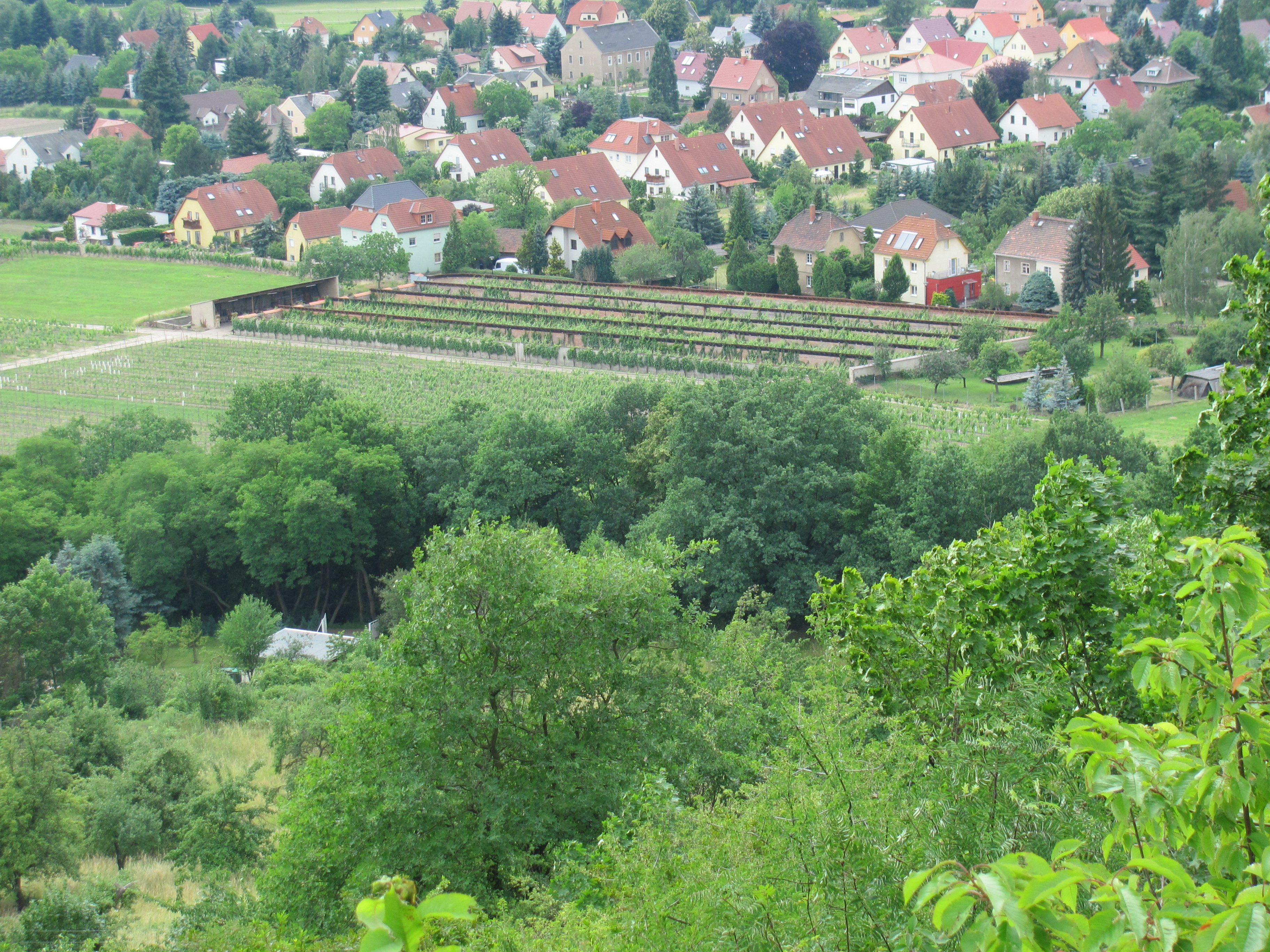 Radebeul Talutanlage von Zechsteinaussicht